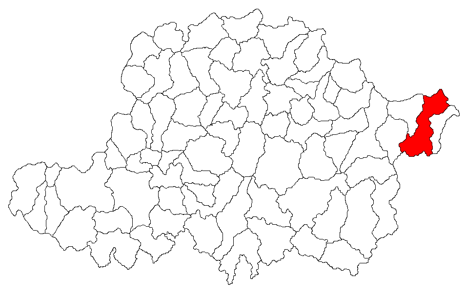 Categorie:Hărţi ale judeţului Arad